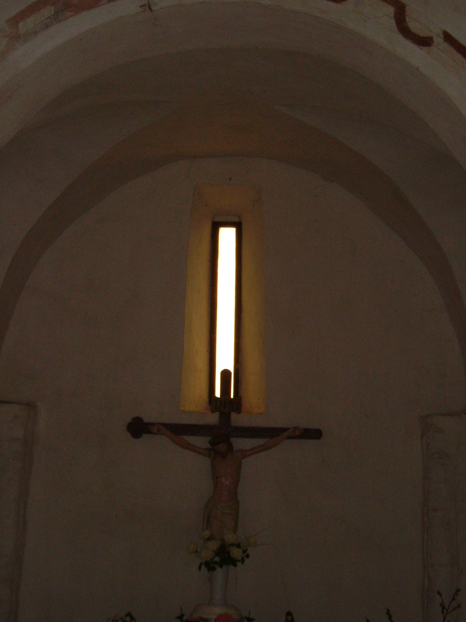 Egregyi román templom szentélye (Hévíz)